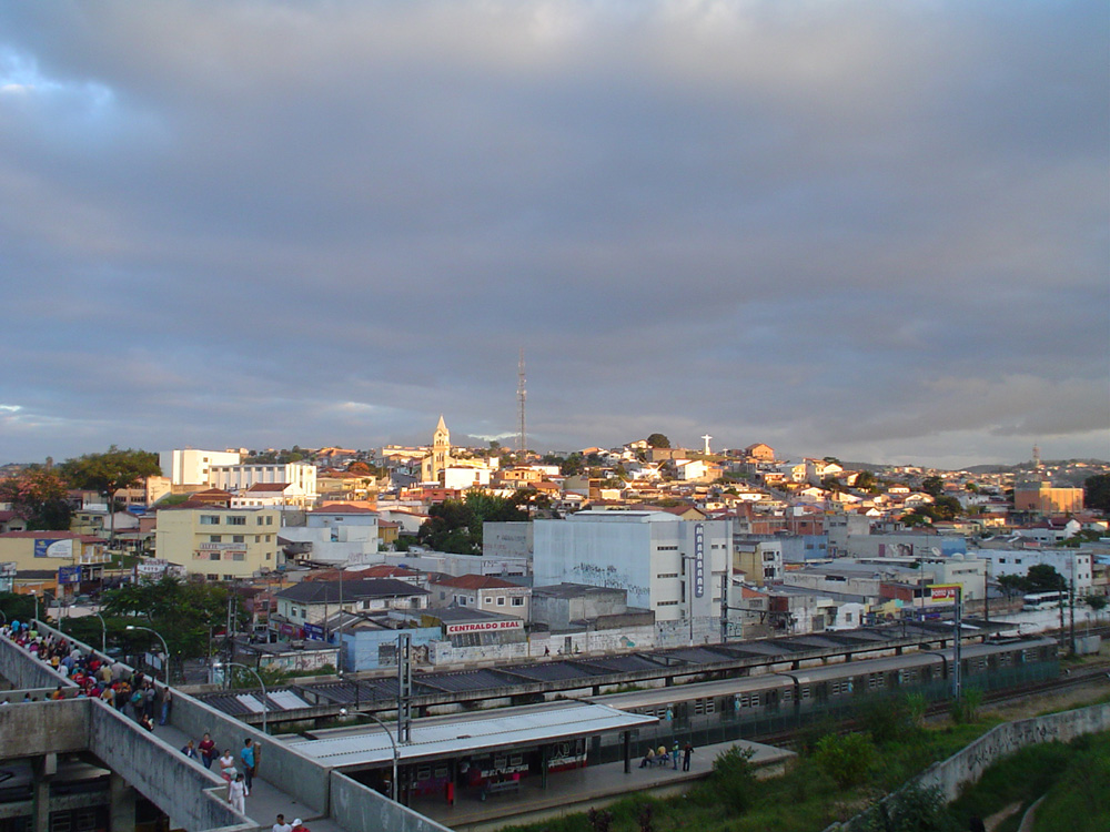 Centro de Itapevi